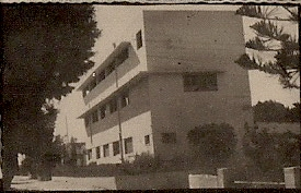 הבניין הישן של בית הספר א.ד.גורדון ברחוב לסל 7 בתל אביב